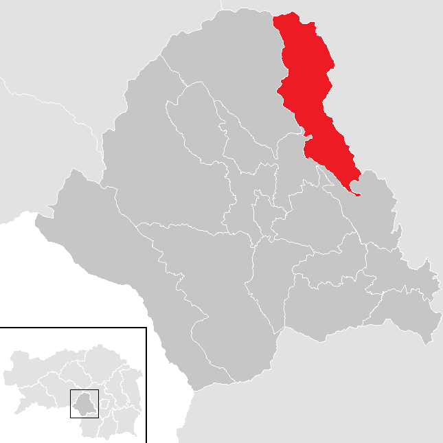 Lage von Geistthal-Södingberg im Bezirk Voitsberg